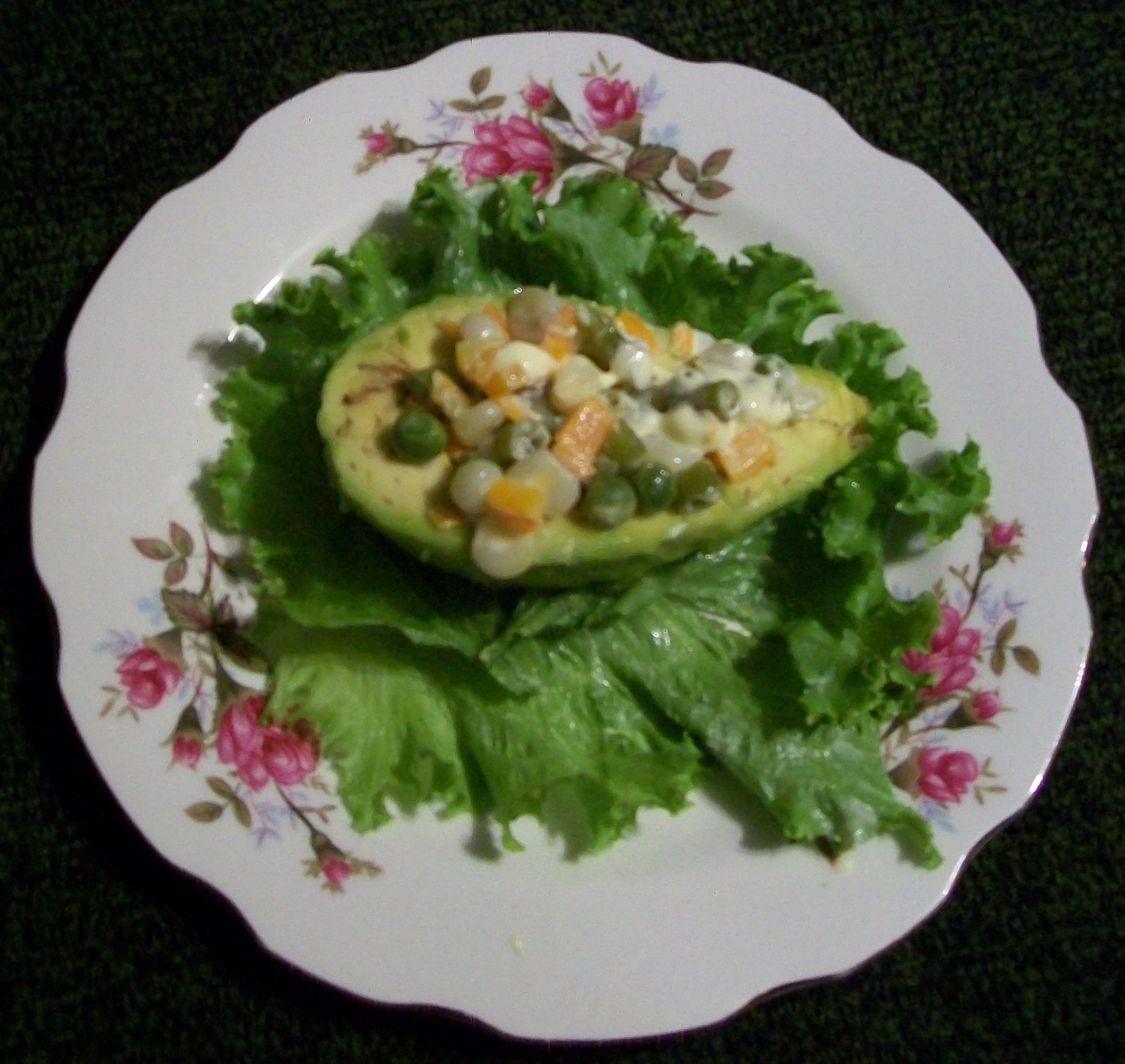 Gastronomia Nombre: Ensalada de Palta Ocrosina País: Perú Fotógrafo: © Edgar Amador Espinoza Montesinos